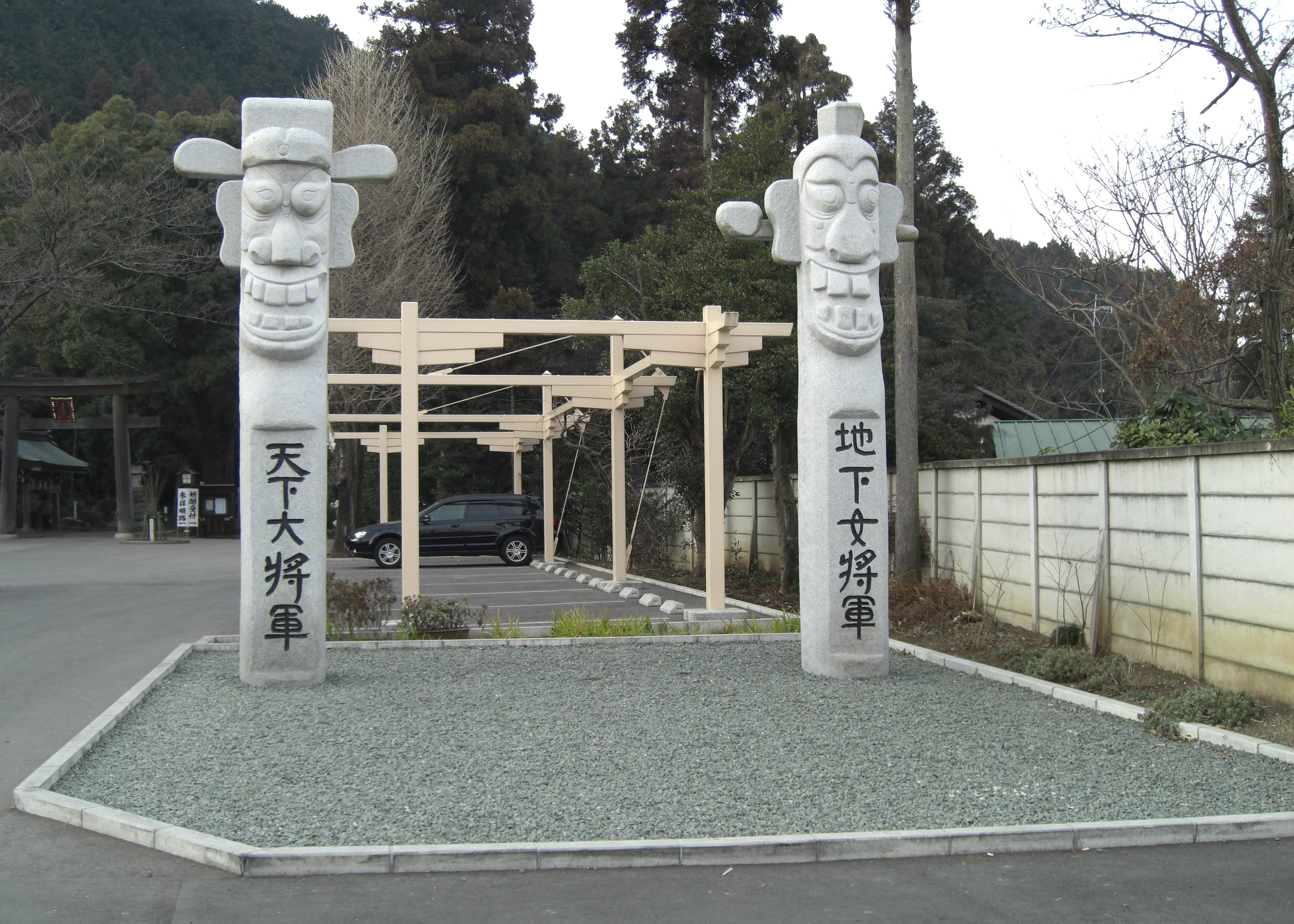 Koma jinja shougunhyou